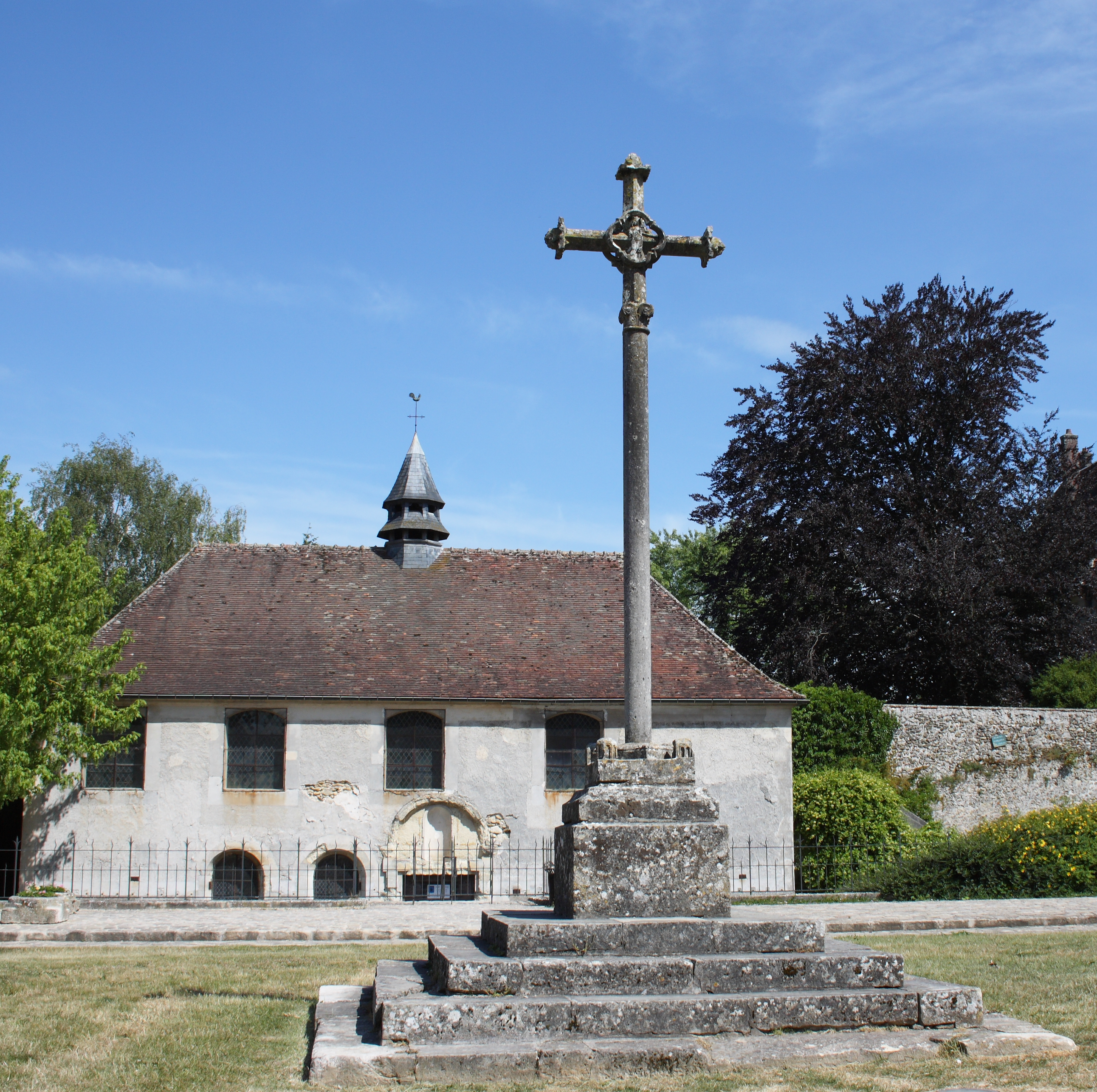 Kreuz (13. Jahrhundert) in Jouarre